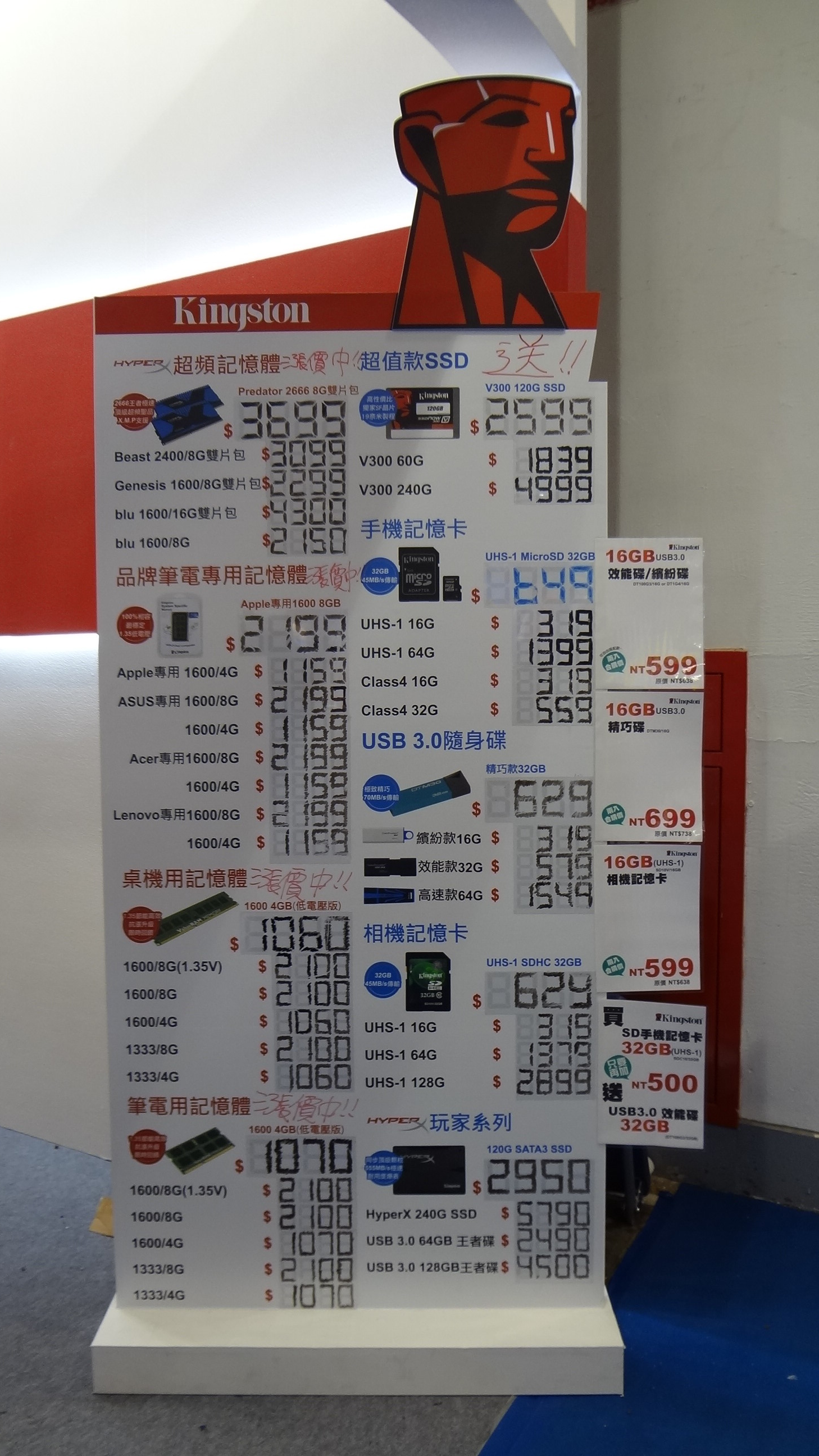 2013年資訊月的金士頓科技攤位商品報價牌。